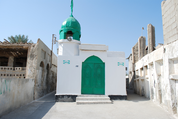 مسجد علي بن علي في قريه بوري البحرينية.